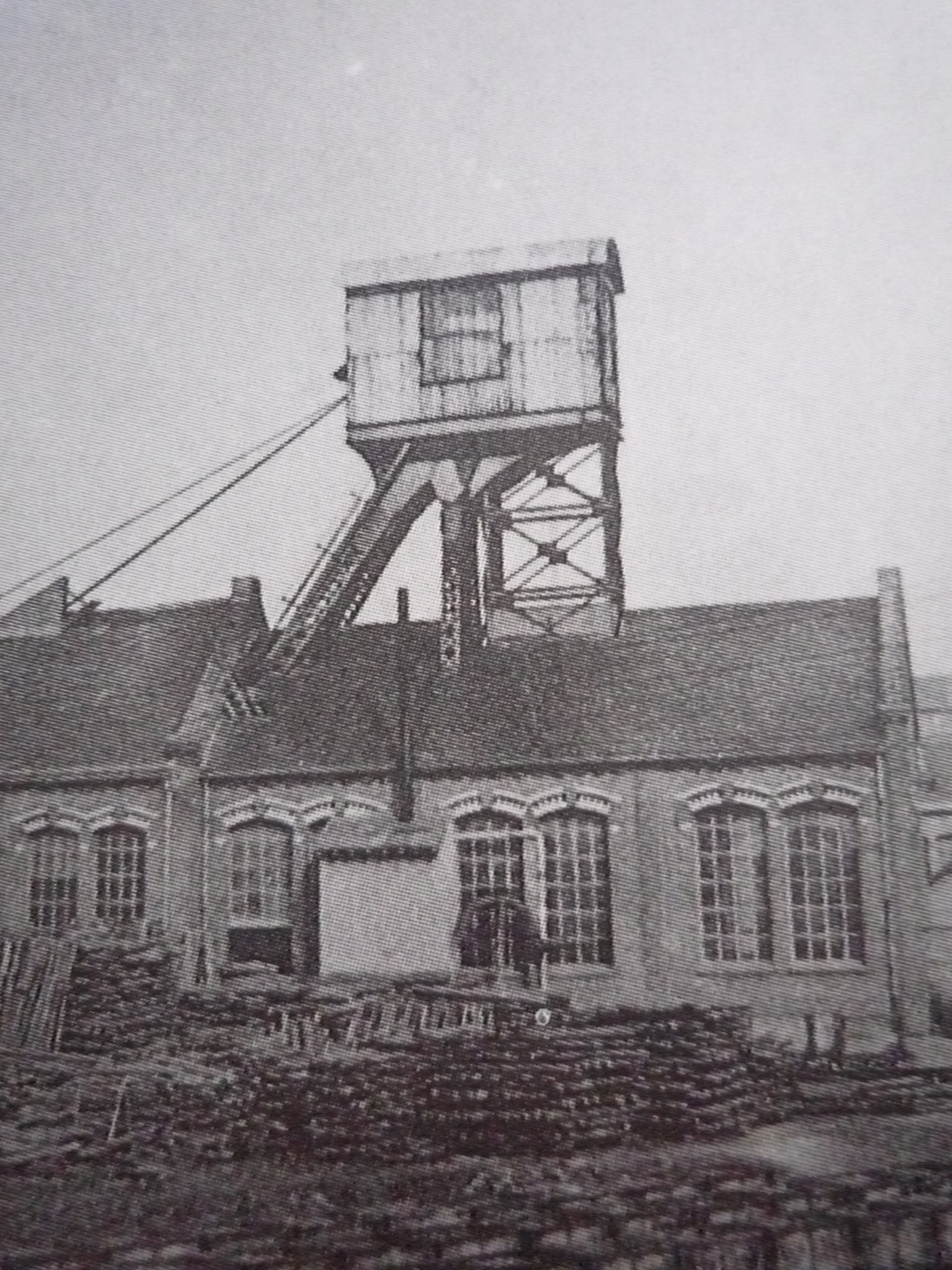 La Fosse n° 11 de la Compagnie des mines de Nœux était un charbonnage constitué d'un seul puits situé à Fouquières-lès-Béthune, Pas-de-Calais, Nord-Pas-de-Calais, France.